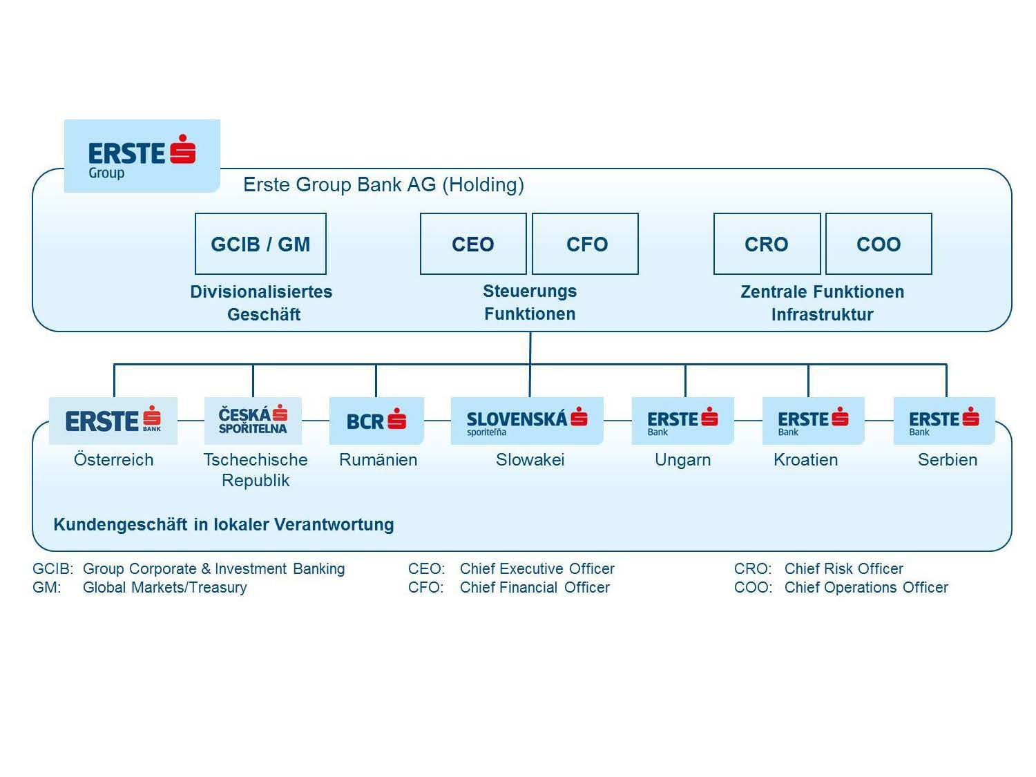 Group Structure